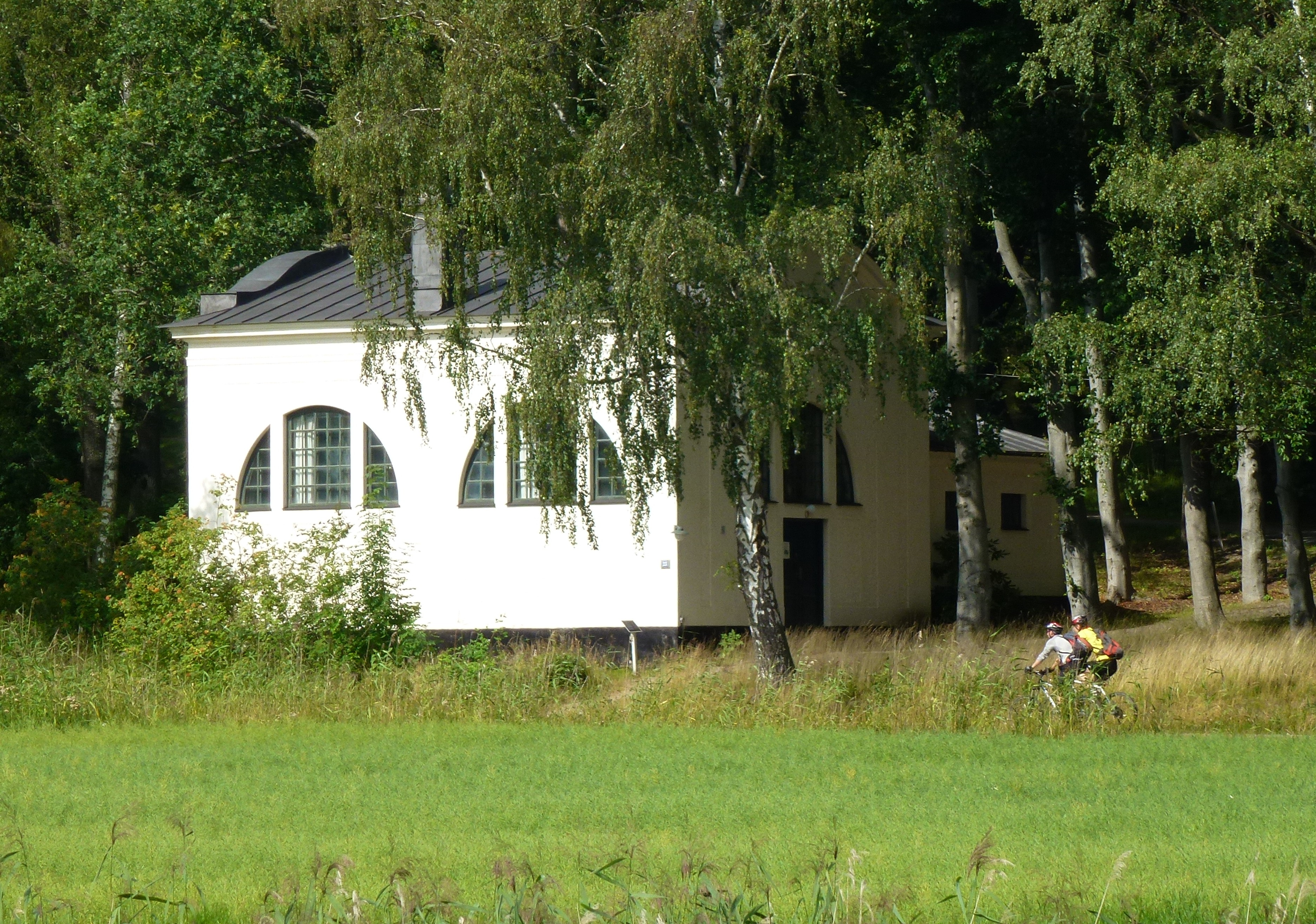 Evert Lundquists ateljé 2012